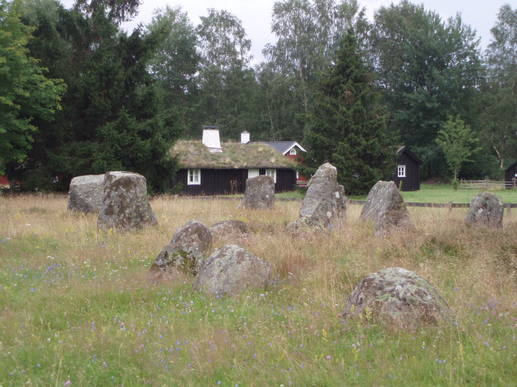 Gravfältet Smålandsstenar (RAÄ-nummer Villstad 52:1) i nordöstra delen av samhället Smålandsstenar, Gislaveds kommun, Jönköpings län, Småland, Sverige.